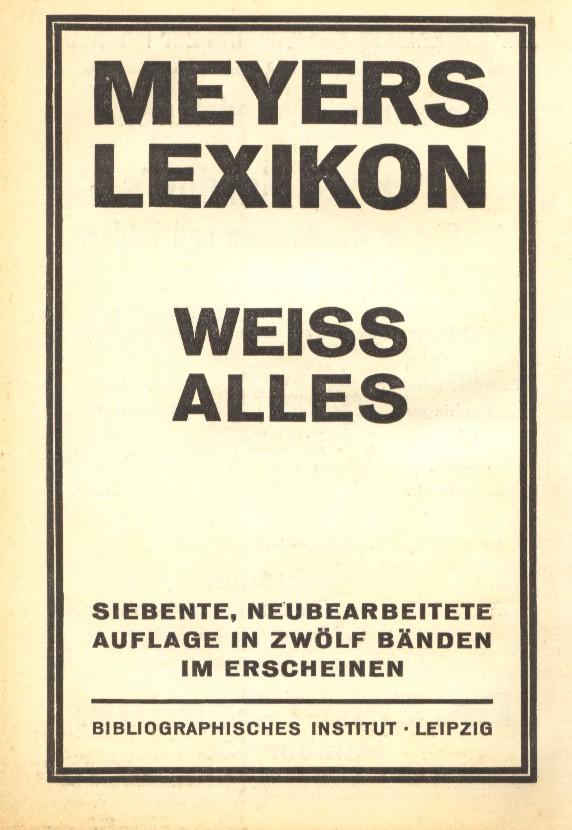 Reclame voor de 7de druk van "Meyers Lexikon" (rond 1925)